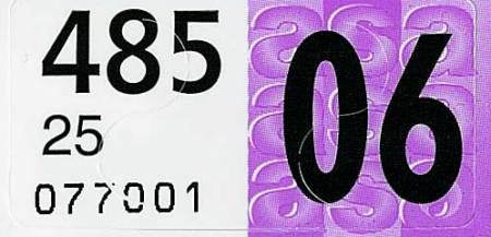 Velovignette (bike sticker switzerland)